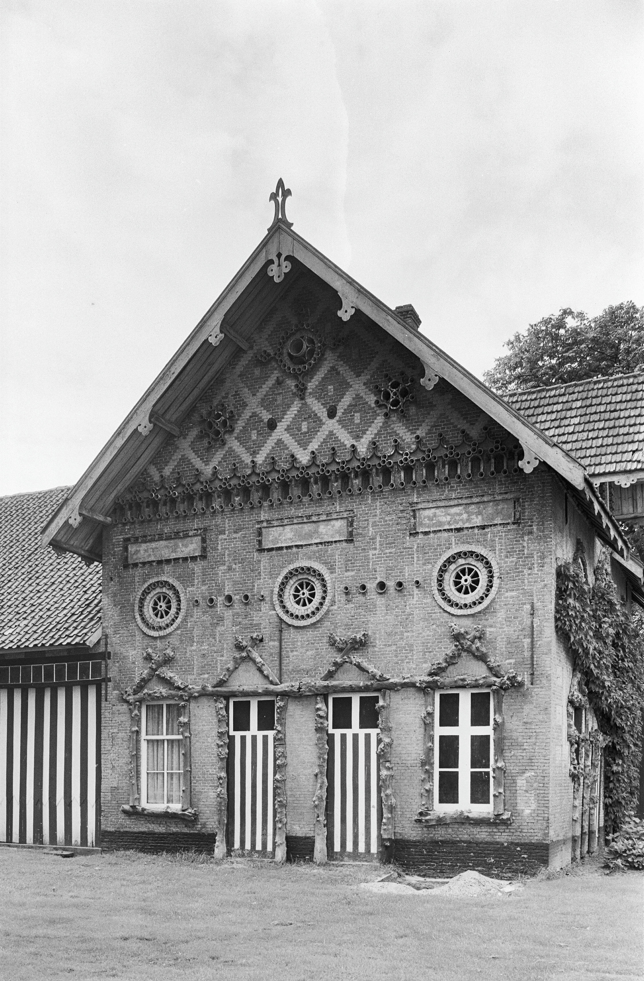 Landgoed Plantage Centrum En West: west, boerderij